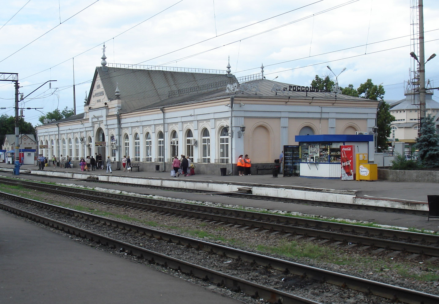 Здание вокзала ЖД-станции Россошь